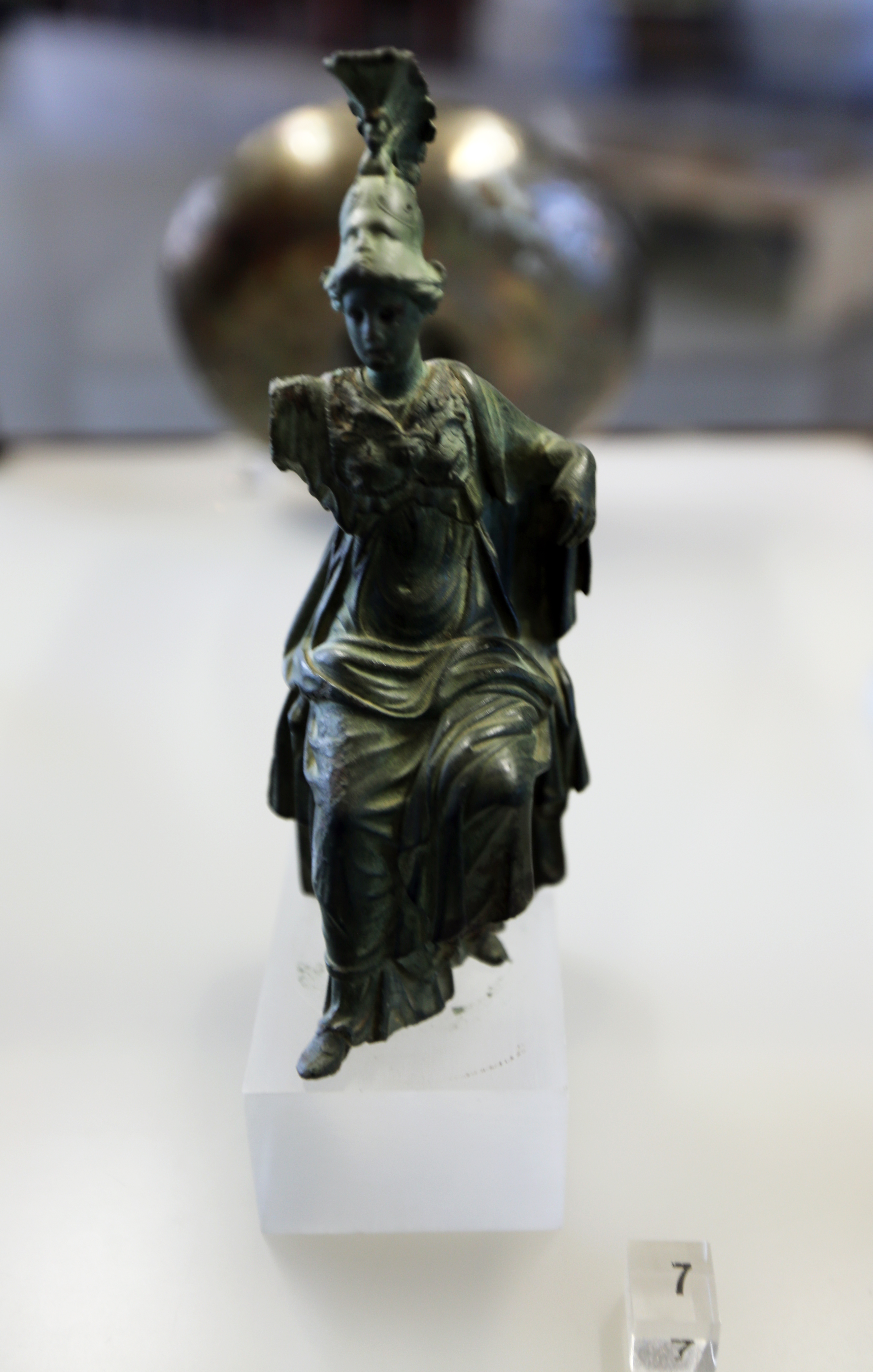 Die nur wenige Centimeter hohe Figur einer thronenden Minerva ist aus Bronze gefertigt und entstammt dem 3.Jh. Fundort Friesheim. Heute RGM Köln, Inv. 58,167